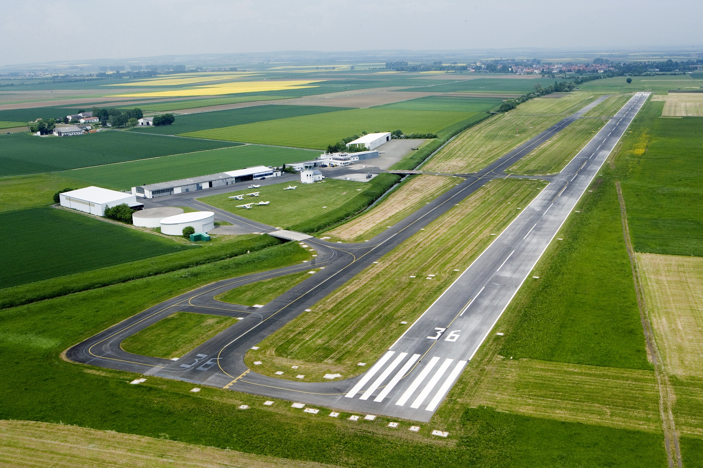 Flugplatz Reichelsheim-Wetterau (EDFB)